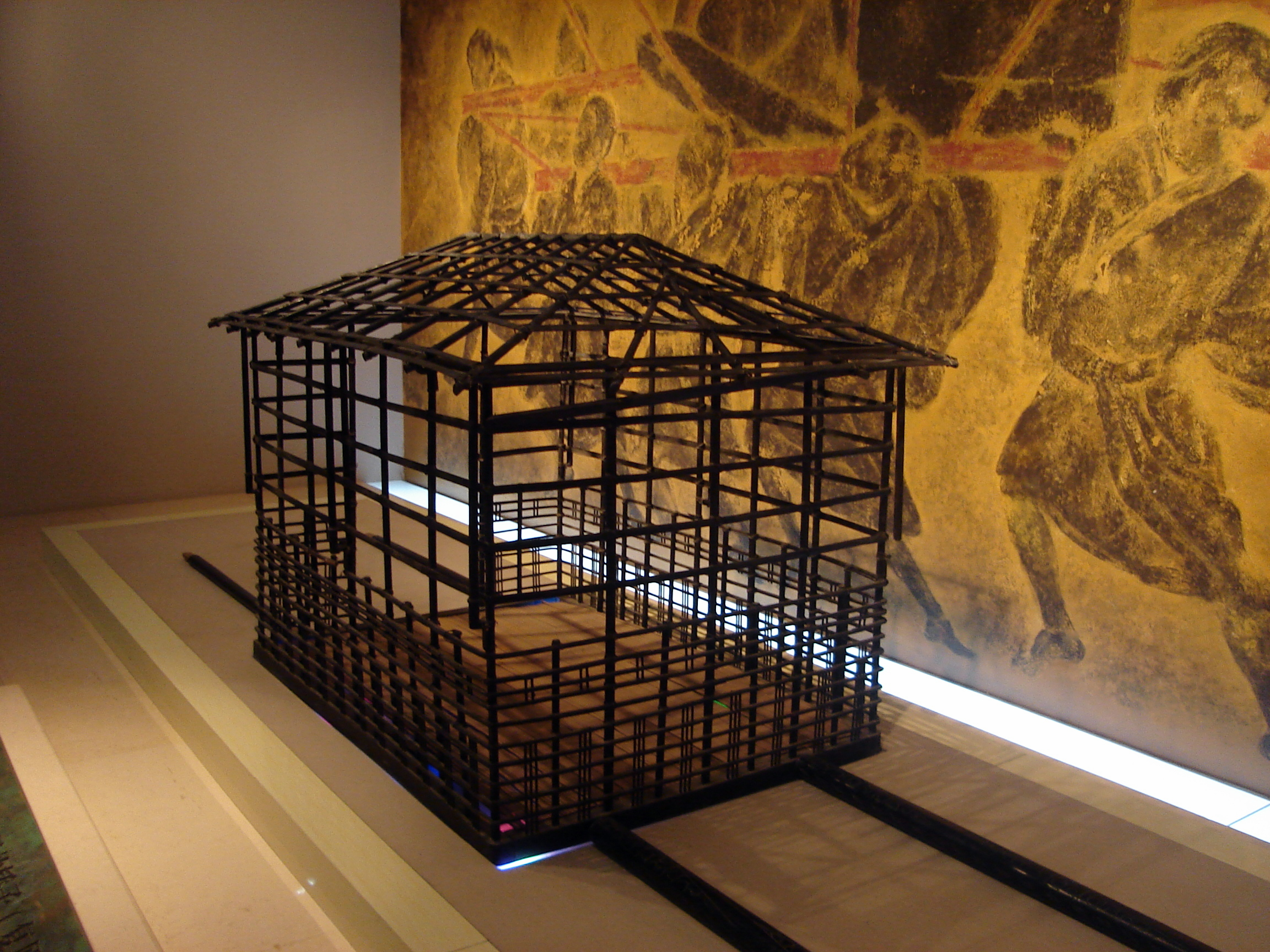 侯古堆一号墓出土肩舆，现藏于信阳博物馆。